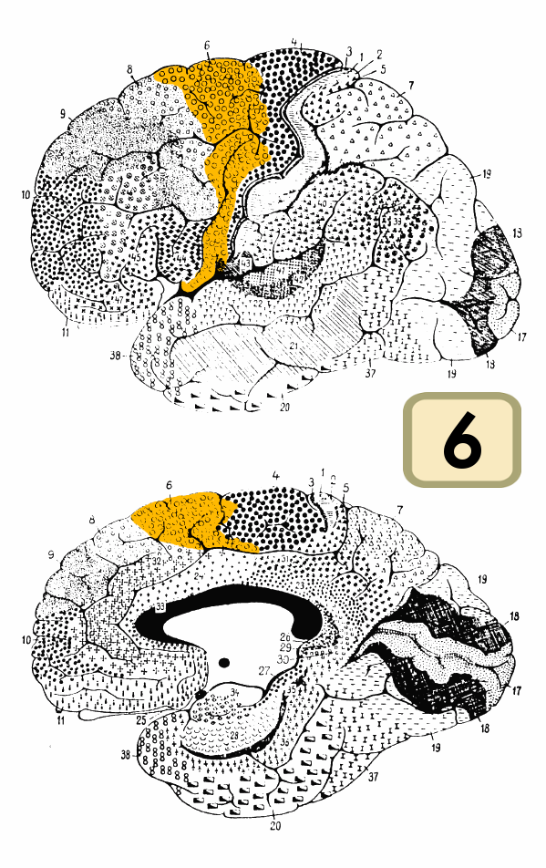 Brodmann area 6.